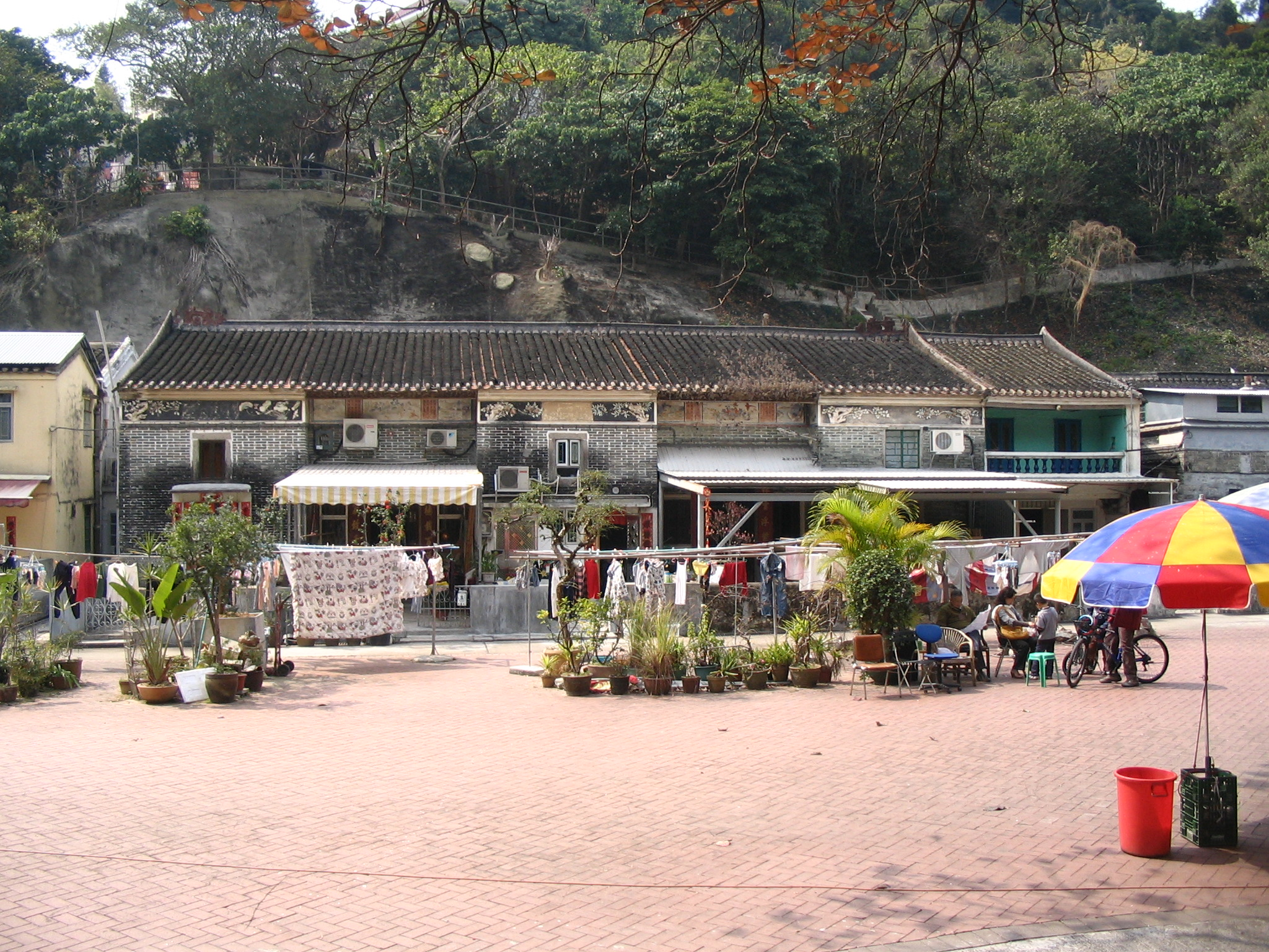 Pai Tau Village